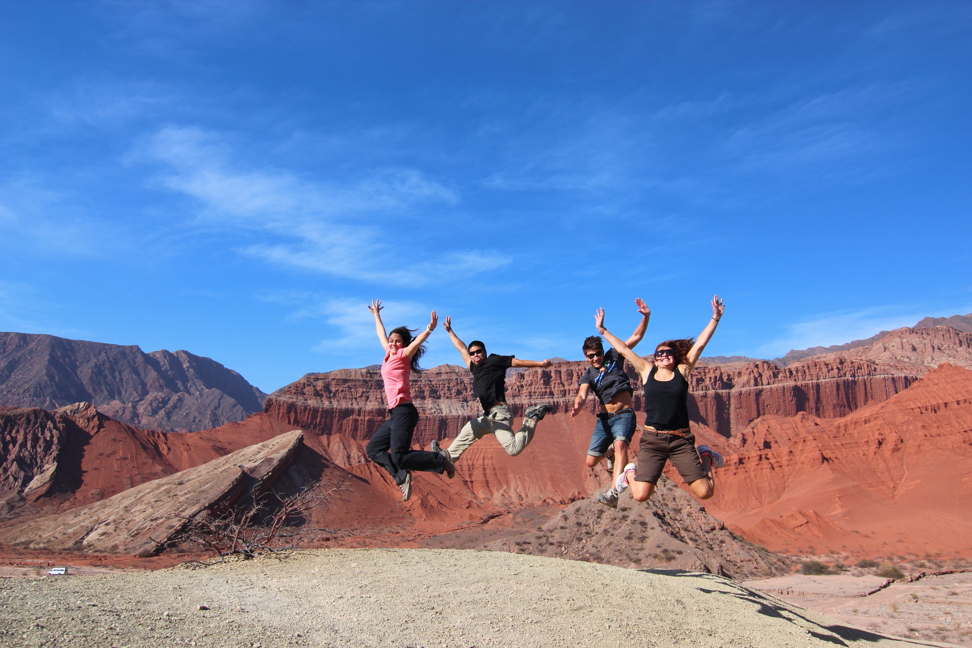 Quebrada de las Conchas, Salta (Argentinien).